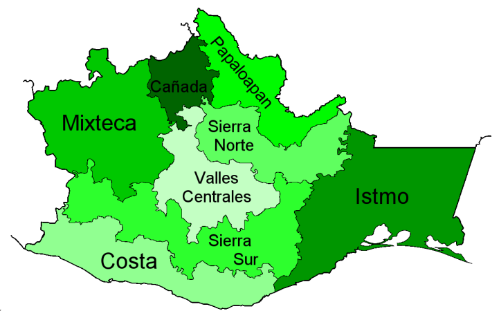 Mapa de las 8 regiones socioculturales de Oaxaca, con un mejor trazado que el anterior. Mapa por: Mario Fuente Cid Fuente: Public Domain